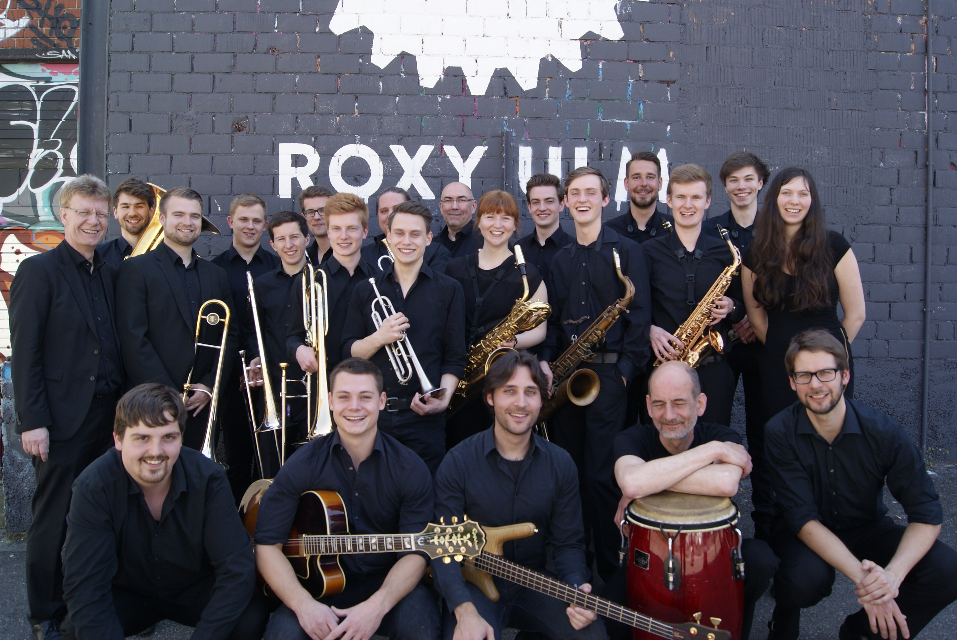 Die Stadthäger Big Band Body & Soul beim Deutschen Orchesterwettbewerb in Ulm 2016